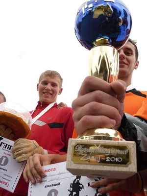 Кубок планета Забей 2010 -- турнир пассионариев